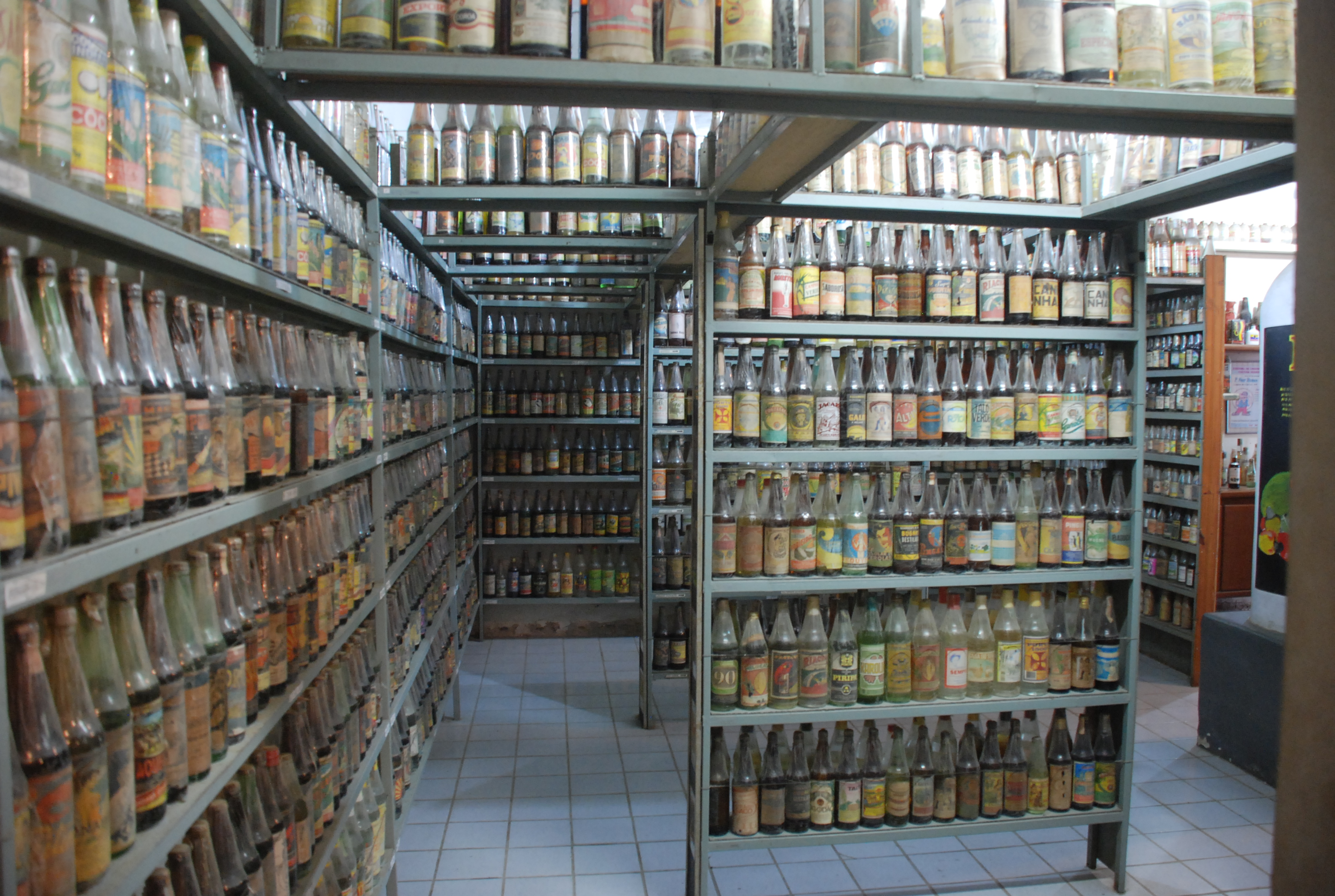 Parte do interior do Museu da Cachaça, Lagoa do Carro, Pernambuco.